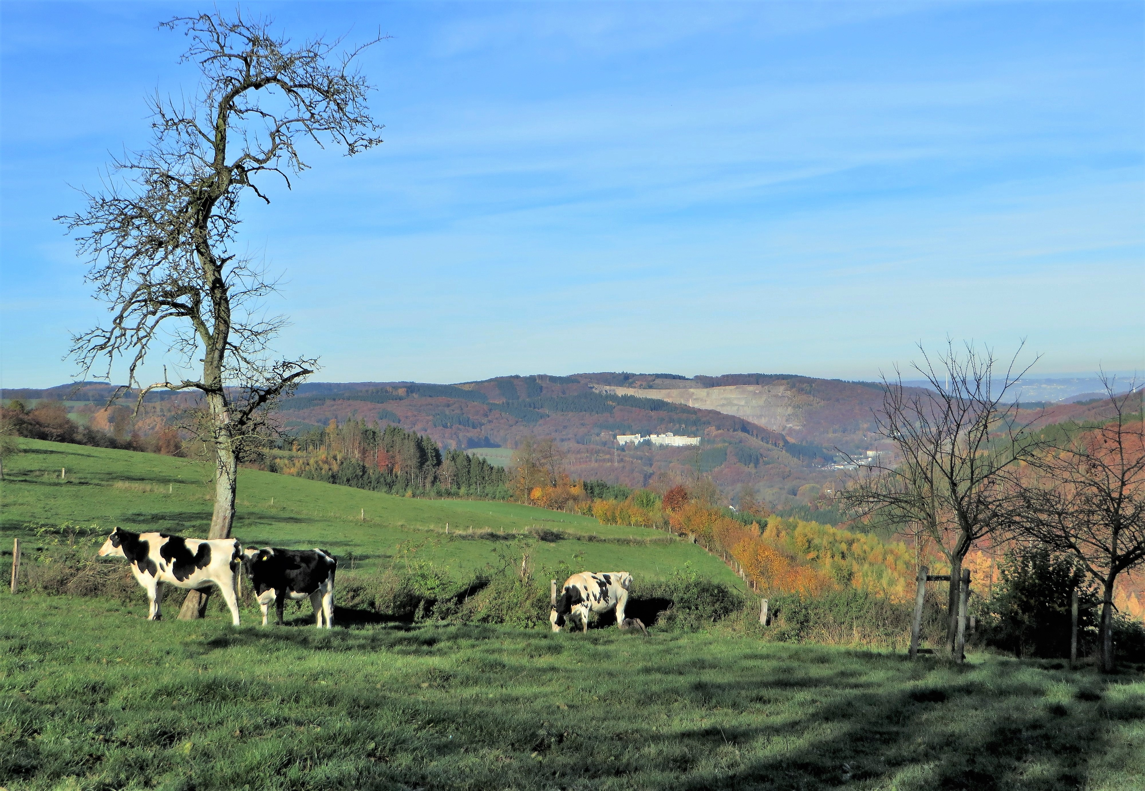 Herbstlich ländliches Idyll auf den Dahler Höhen in Hagen. Blick von Hof Rumscheid (erstmals 1050 erwähnt) zur Fachklinik Ambrock und den im Hintergrund gelegenen Steinbruch Ambrock. Der abgebildete vordere Bereich um Rumscheid liegt im Landschaftsschutzgebiet „Brantenberg, Stapelberg“. Die überwiegend bewaldeten Flächen sind von zahlreichen Bachläufen durchzogen. Höchste Erhebungen: Brantenberg (350 m) und Stapelberg (355 m).